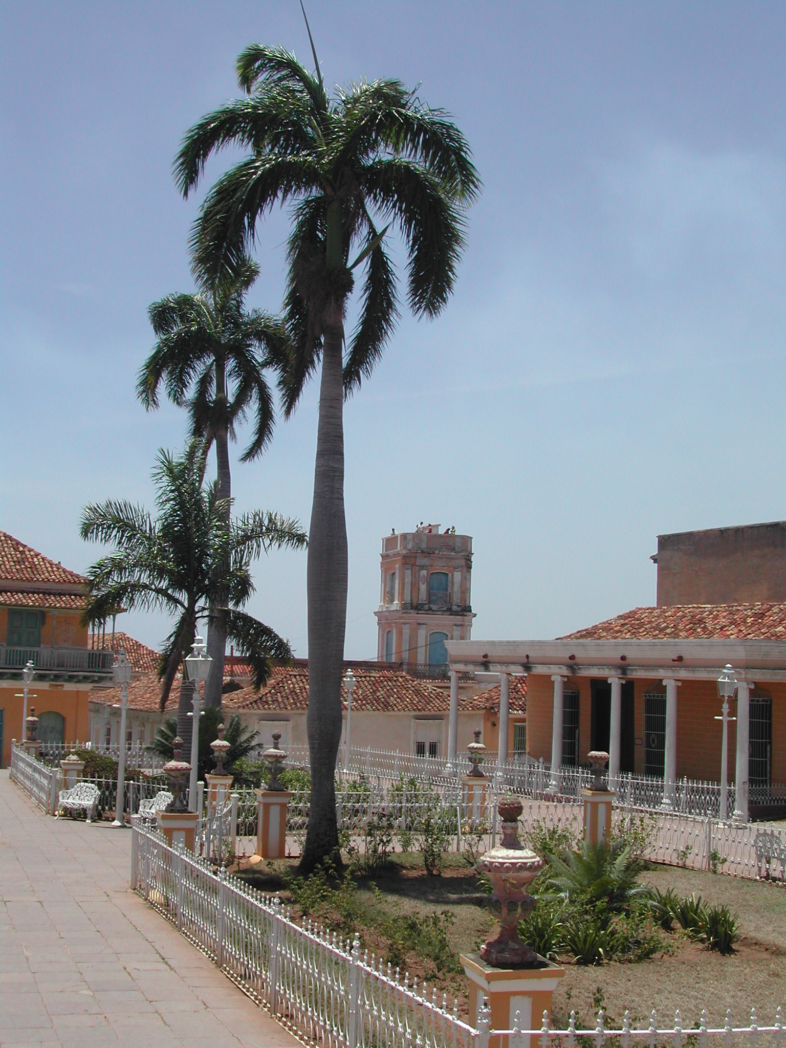 La tour du Musée d'Histoire (Palais Cantero) vue depuis la Plaza Mayor à Trinidad, Cuba.